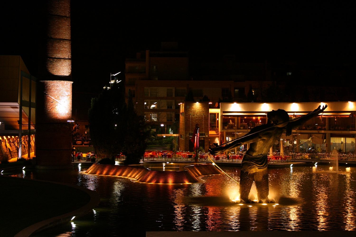 em Ermesinde :)